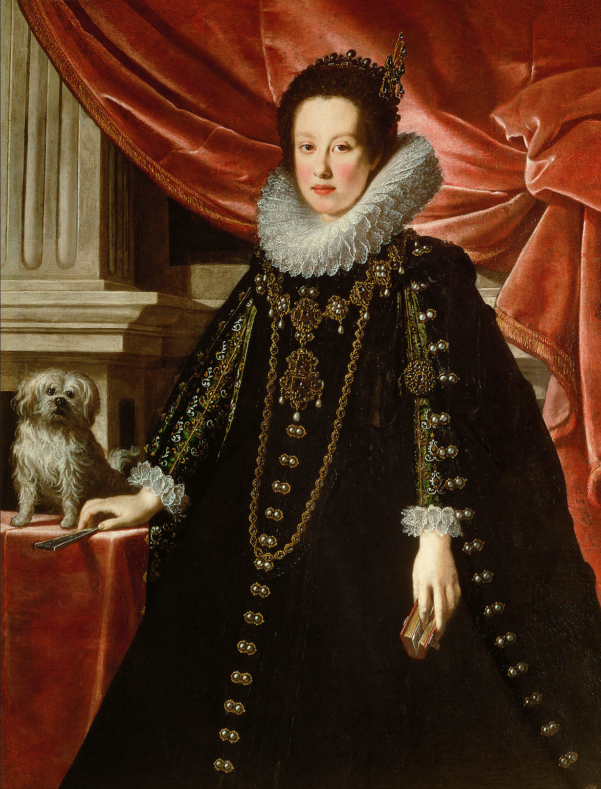 Anna de' Medici (1616-1676), Erzherzogin, mit einem Schoßhündchen, Dreiviertelporträt Anna de' Medici, wife of archduke Ferdinand Charles of Austrialabel QS:Lde,"Anna de' Medici, Ehefrau von Erzherzog Ferdinand Karl von Österreich" label QS:Len,"Anna de' Medici, wife of archduke Ferdinand Charles of Austria"